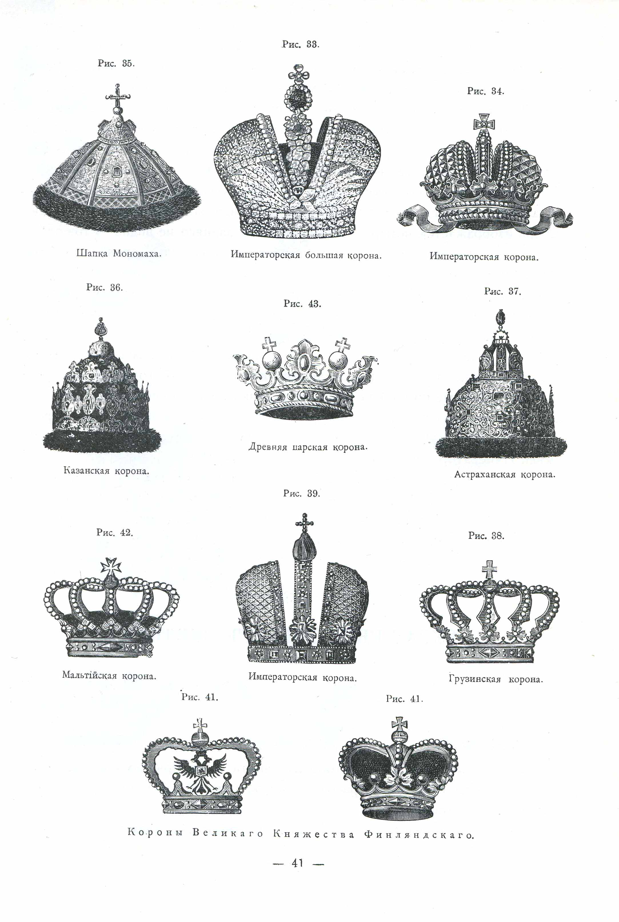 Page 41 of Gerbovnik Vinklera. Heraldry Russian crouns. Лист 41 Гербовника Винклера. Русские геральдические короны.